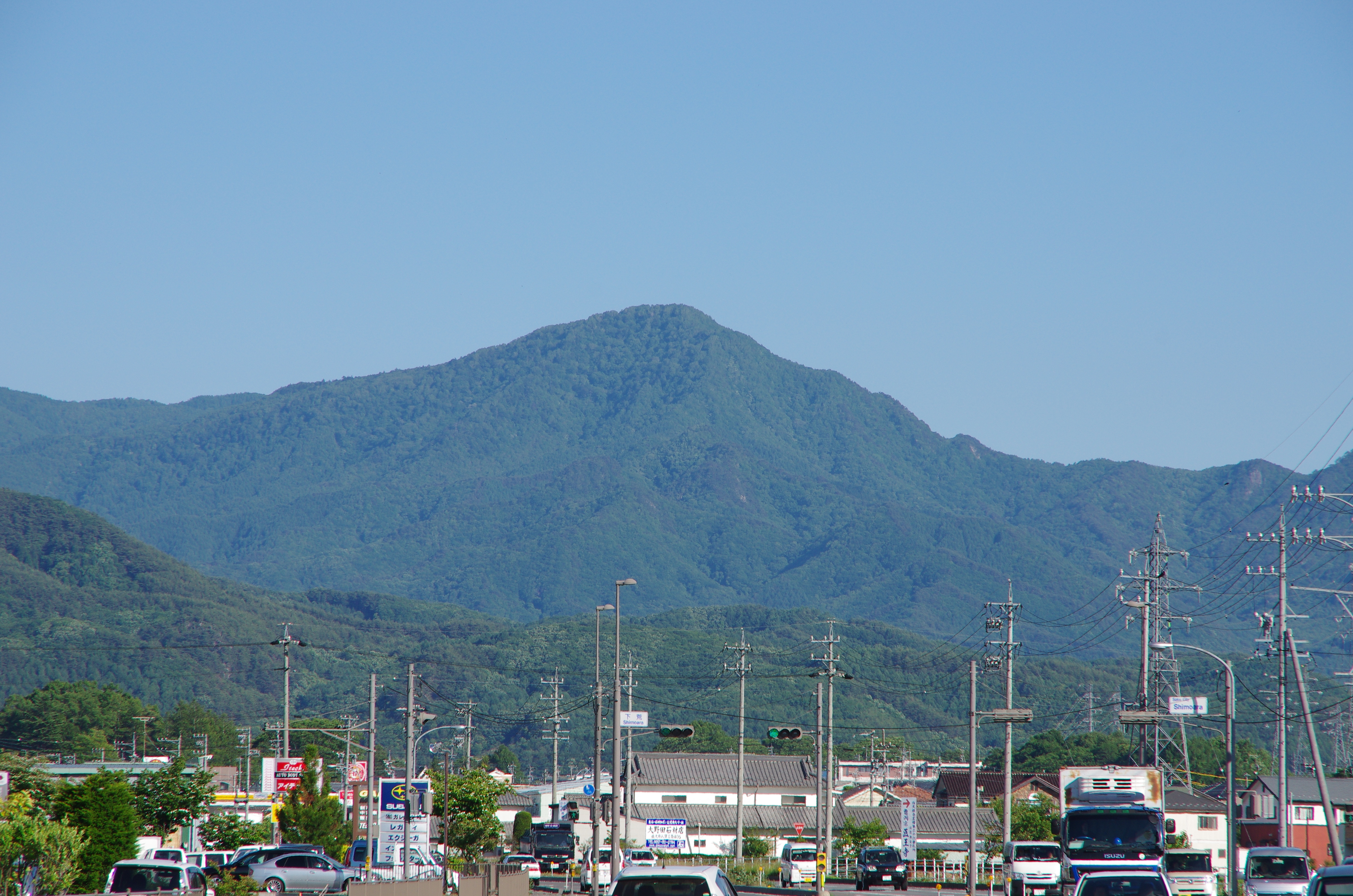 佐久市臼田の国道141号沿いから見た茂来山。